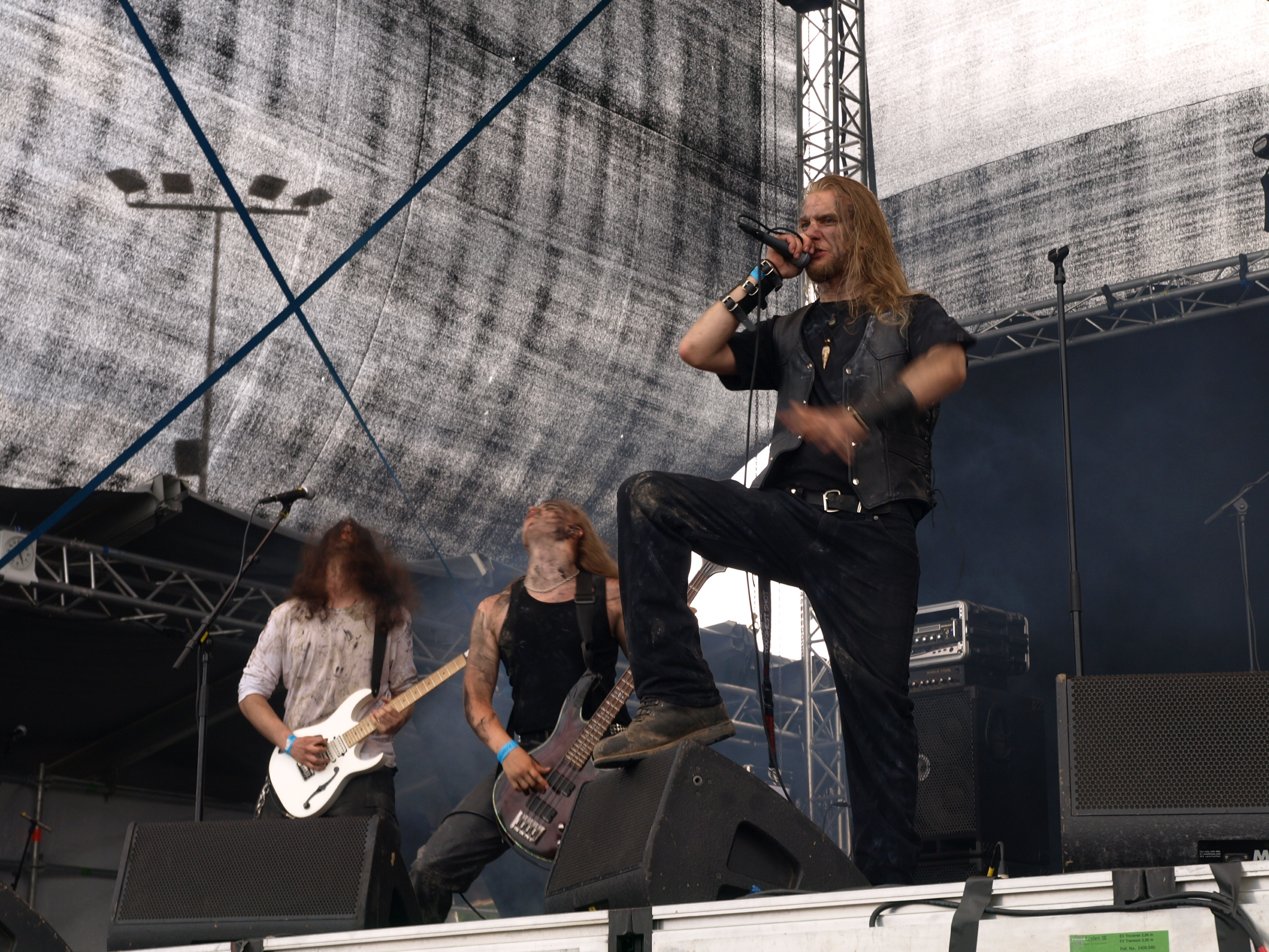 Brymir live am Myötätuulirock 2011